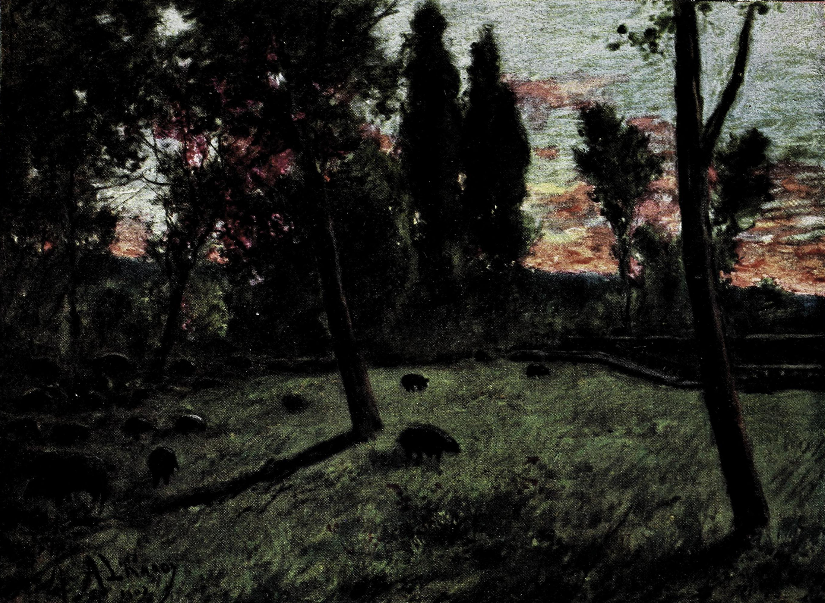 En la Moncloa.